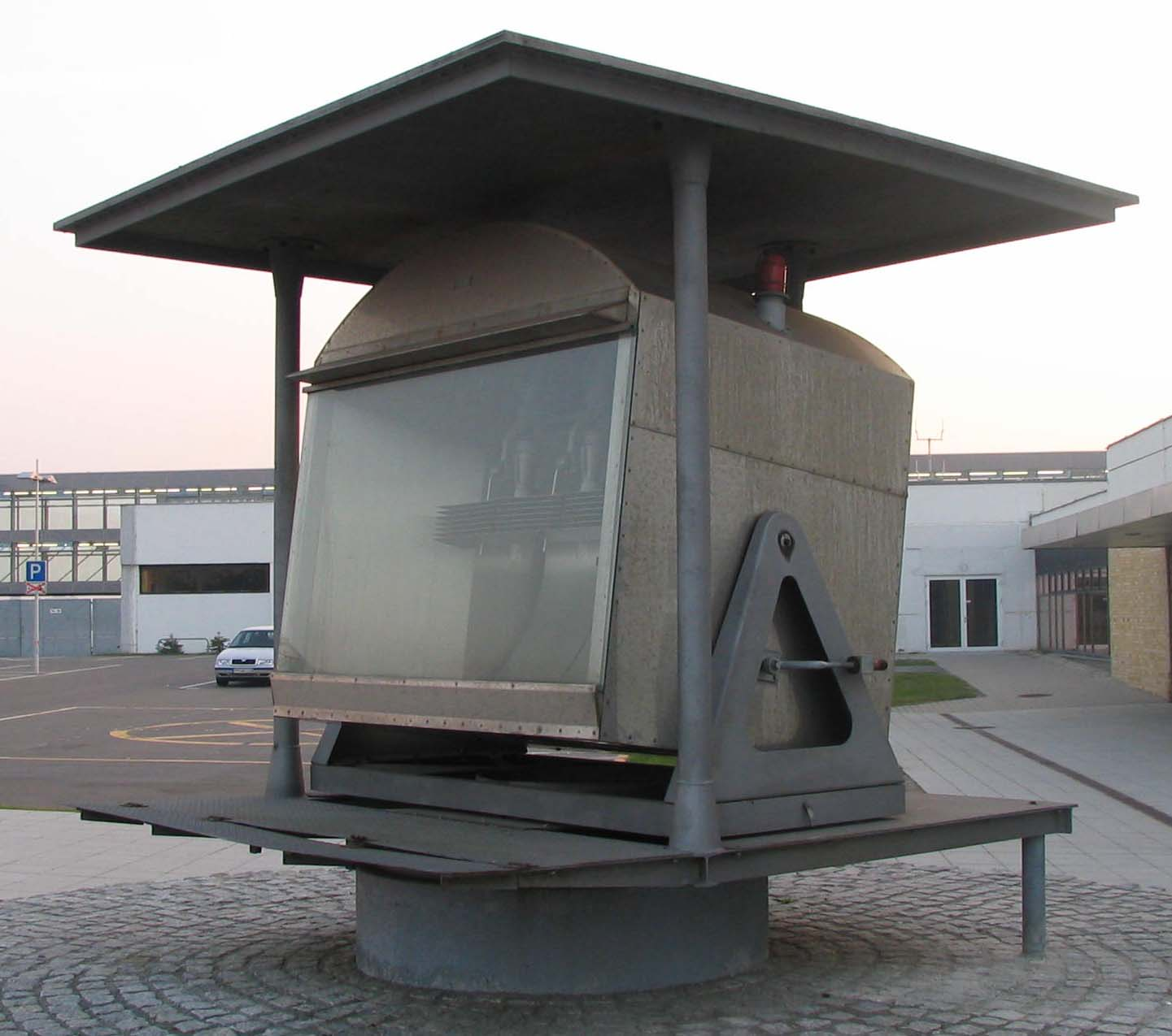 Leuchtfeuer der Firma AEG aus dem Jahre 1939 auf dem Flughafen Leipzig/Halle.